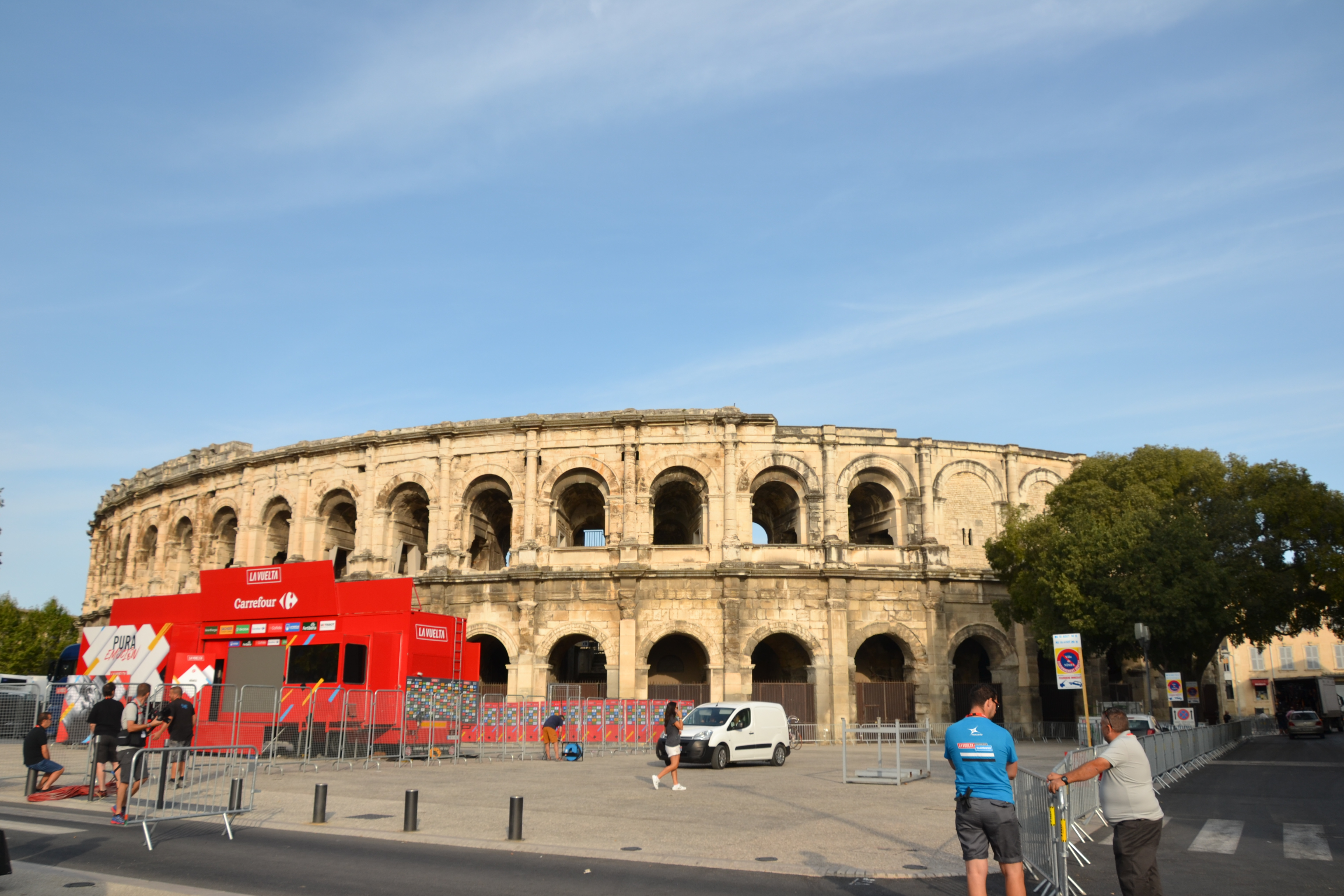 préparatif aux arènes de Nîmes du Tour d'Espagne à Nîmes